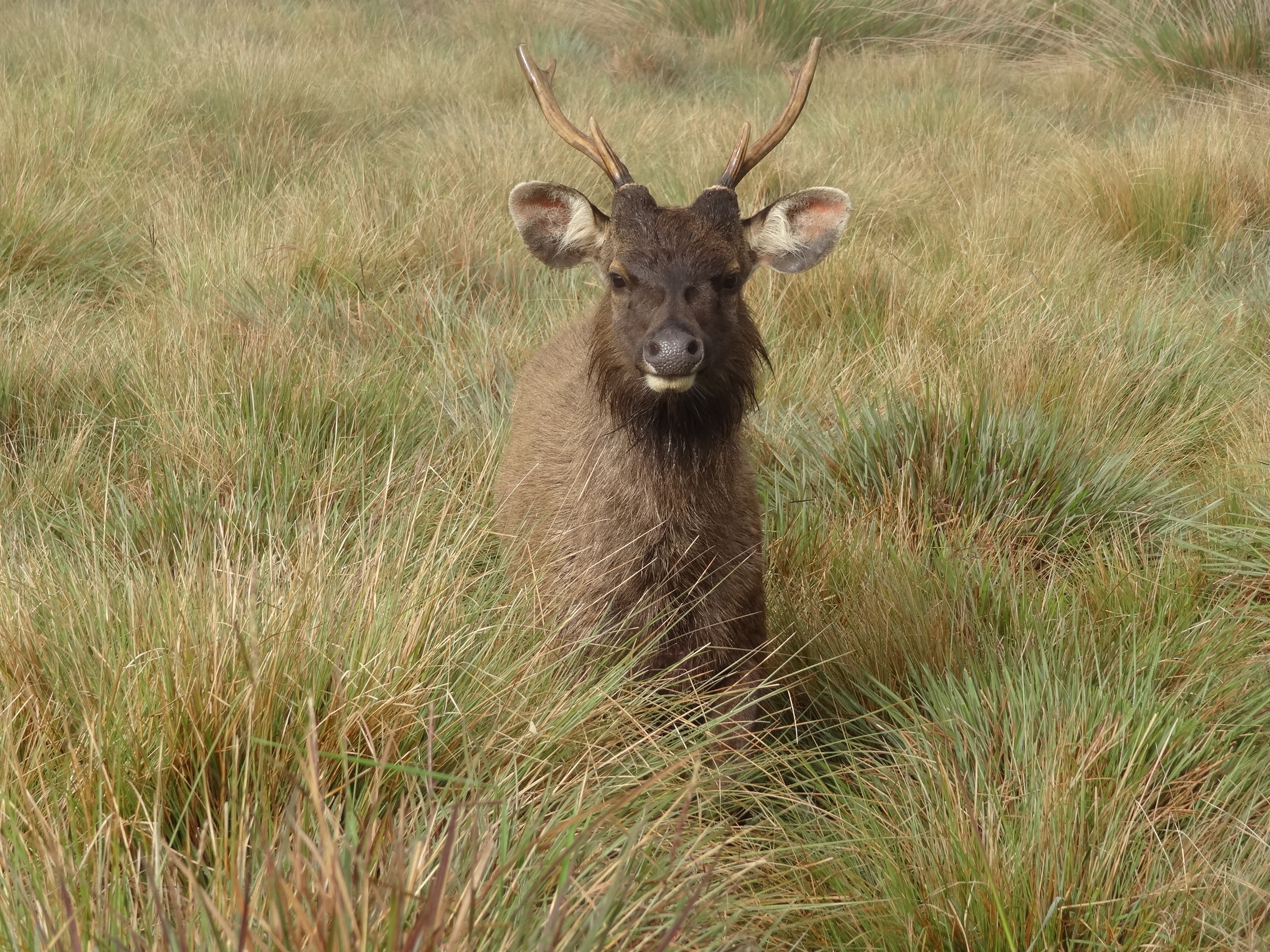 Sambar in Horton Plains National Park